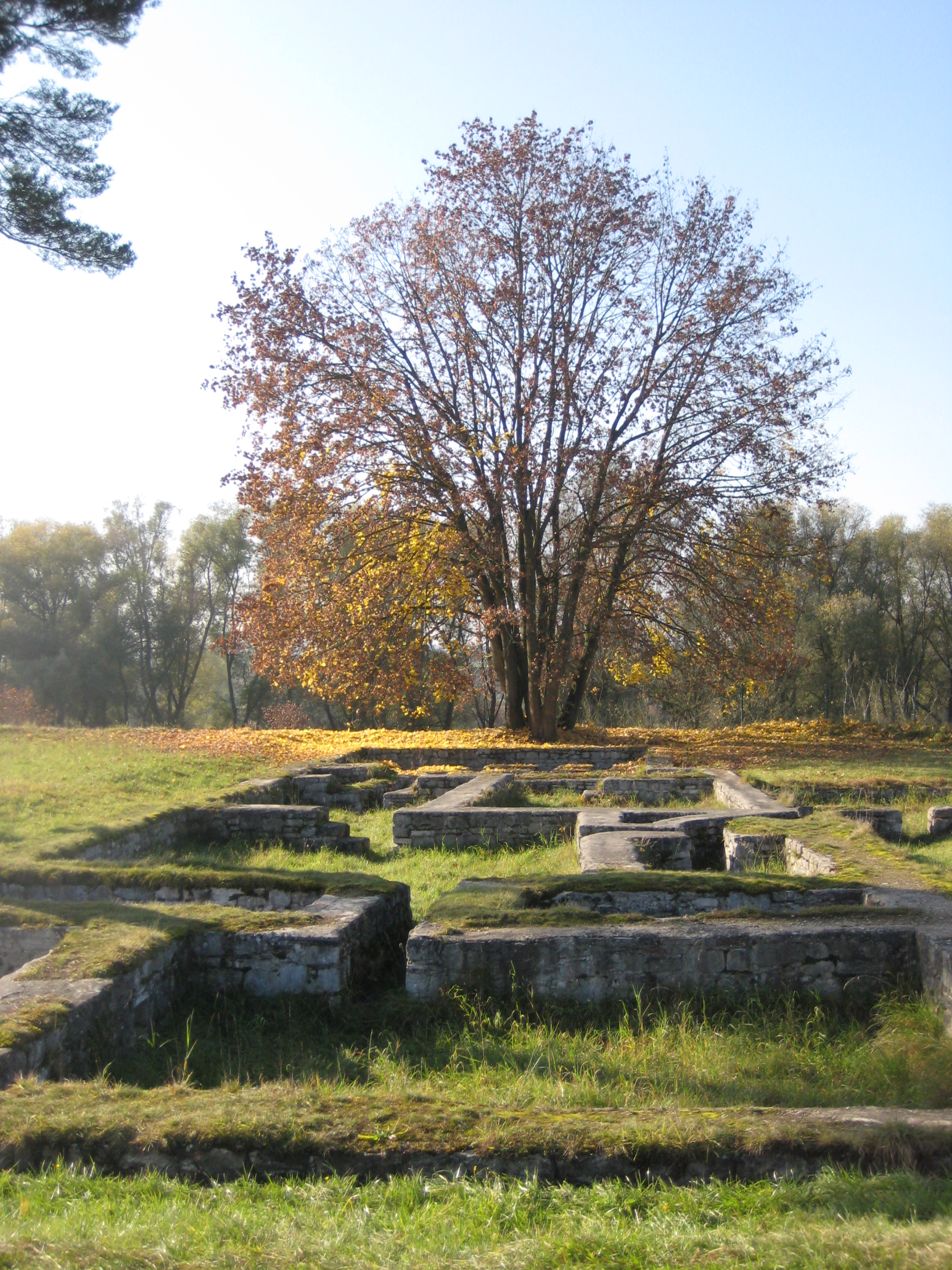 Kastell Eining: Mansio (Rasthaus) (Blick nach Westen zum Donausteilufer)